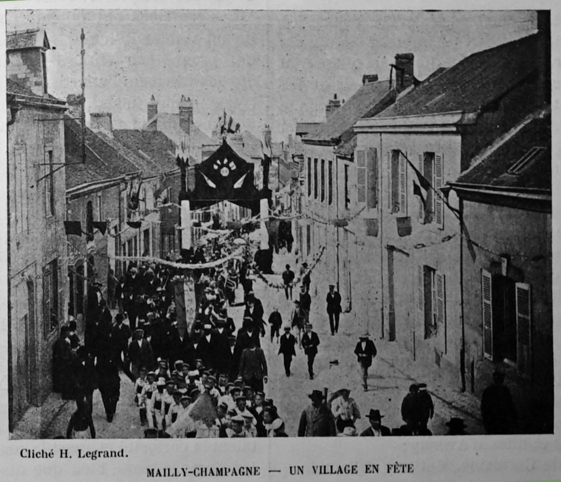 publié dans le ː "Bulletin de l'œuvre des voyages scolaires".